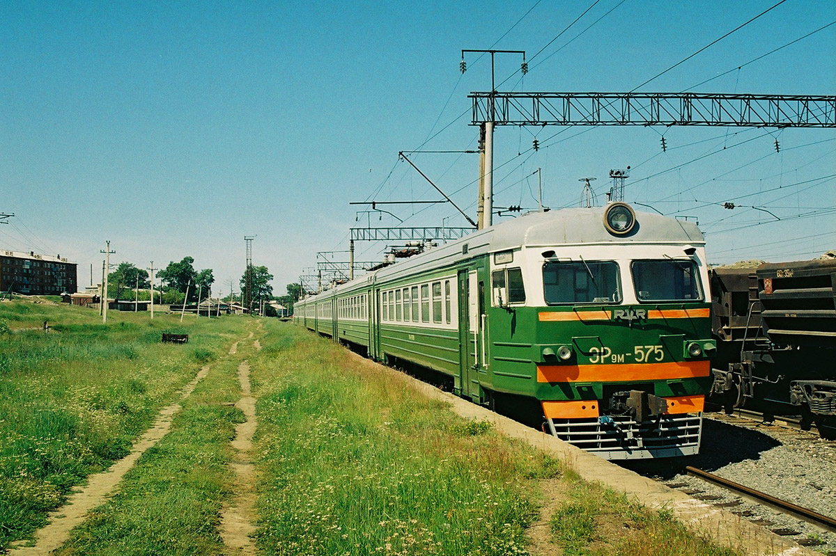 Электропоезд ЭР9М-575 Россия, Бурятия, станция Мысовая